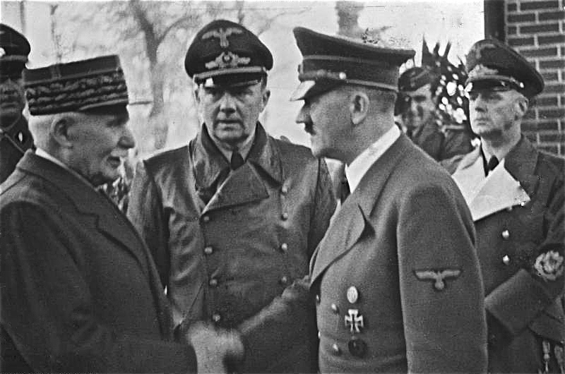 Henry Philippe Petain und Adolf Hitler zentralbild 153-40 II. Weltkrieg 1939-45 24.10.1940 Adolf Hitler begrüßt den französischen Staatschef Marschall Henry Philippe Petain in Montoire-sur-le-Loir. In der Mitte Chefdolmetscher Gesandter Dr. Paul Schmidt. Rechts Reichsaußenminister Joachim von Ribbentrop. Abgebildete Personen: Hitler, Adolf: Reichskanzler, Deutschland Petain, Philippe: Staatschef, Marschall, Frankreich Ribbentrop, Joachim von: Außenminister, NSDAP, Deutschland Schmidt, Paul Otto Gustav Dr.: Chefdolmetscher von Hitler, Pressechef im Auswärtigen Amt, Deutschland